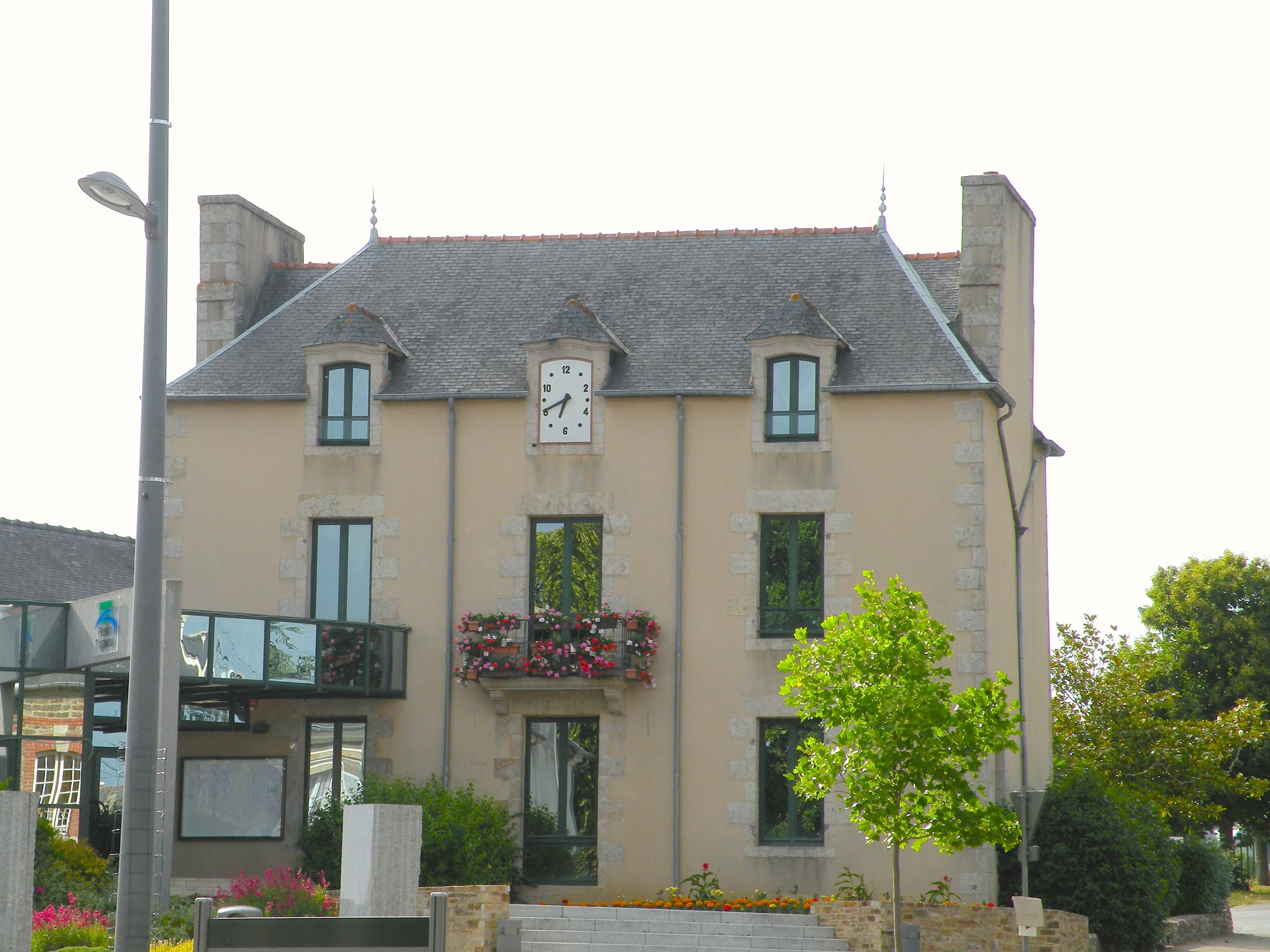 An ti-kêr Plelin-Tregavoù.